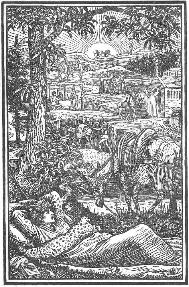 Frontispice de Travel with a donkey in the Cevennes de Robert Louis Stevenson (Chatto & Windus, 1907) réalisé par Walter Crane. L'image scannée provient du Projet Gutenberg ([1]).